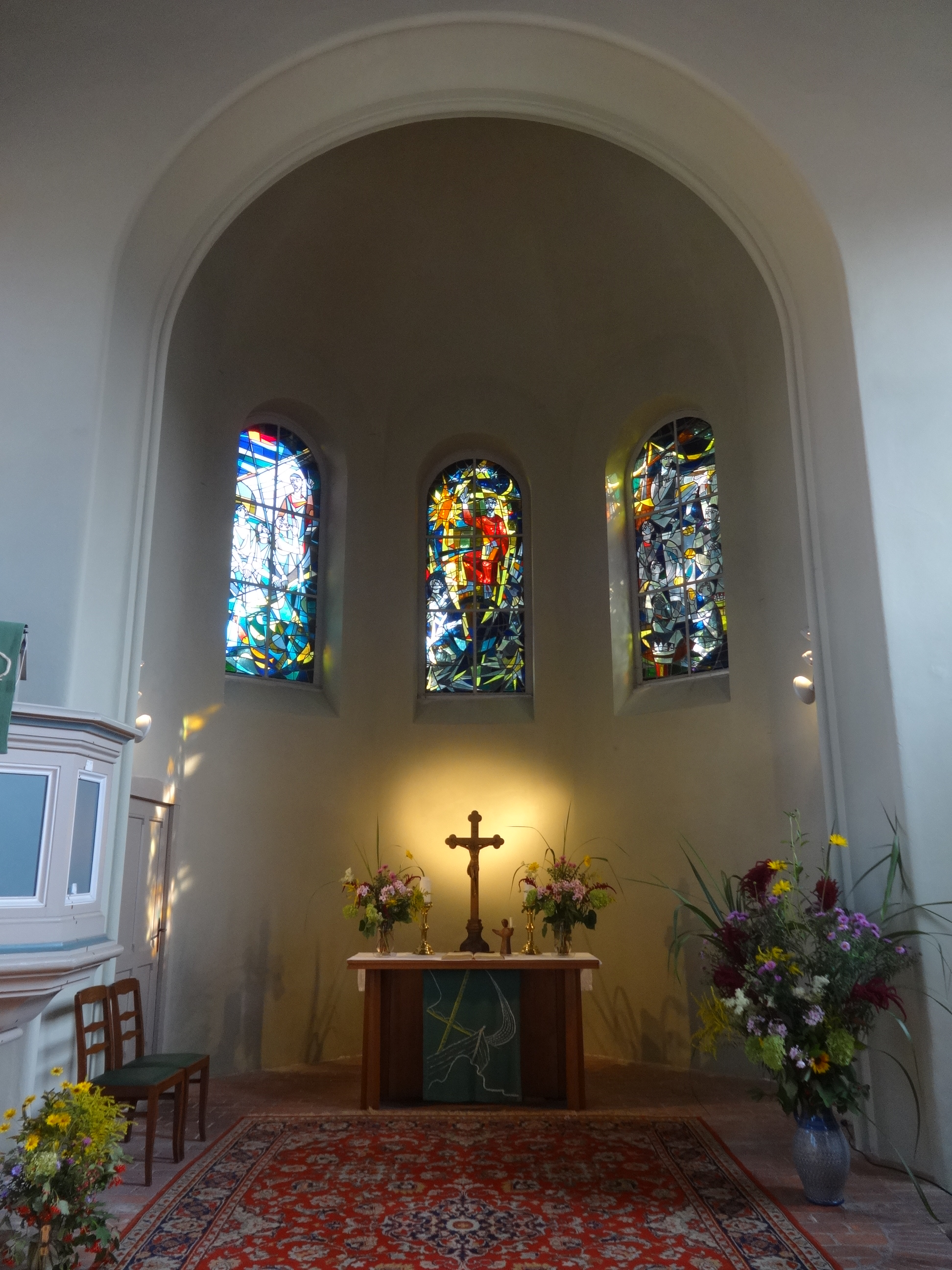 Dorfkirche in Berlin-Rahnsdorf, entstanden 1886 bis 1888 im Rundbogenstil der späten Schinkelschule.